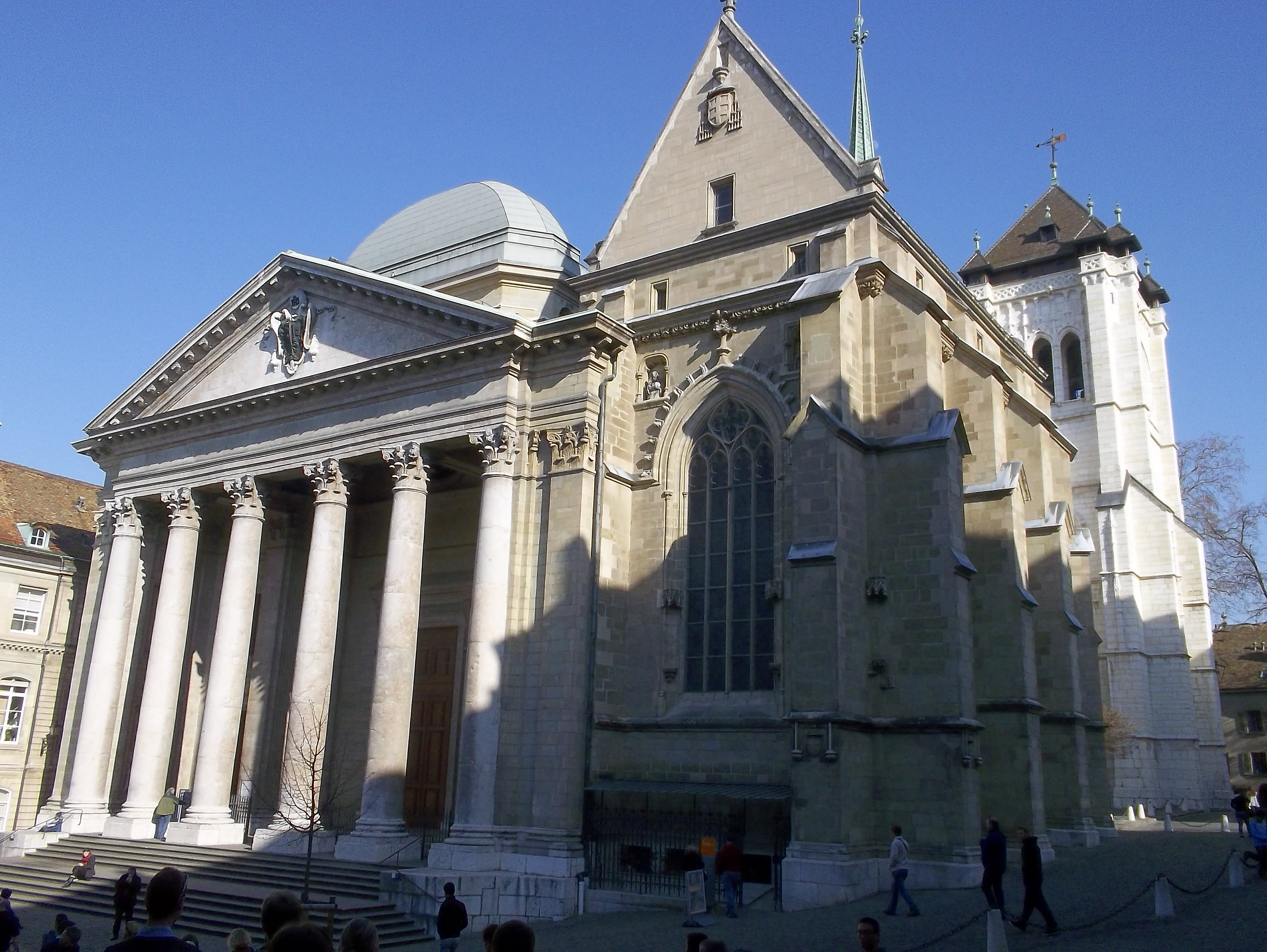 Catedral de San Pedro de Ginebra